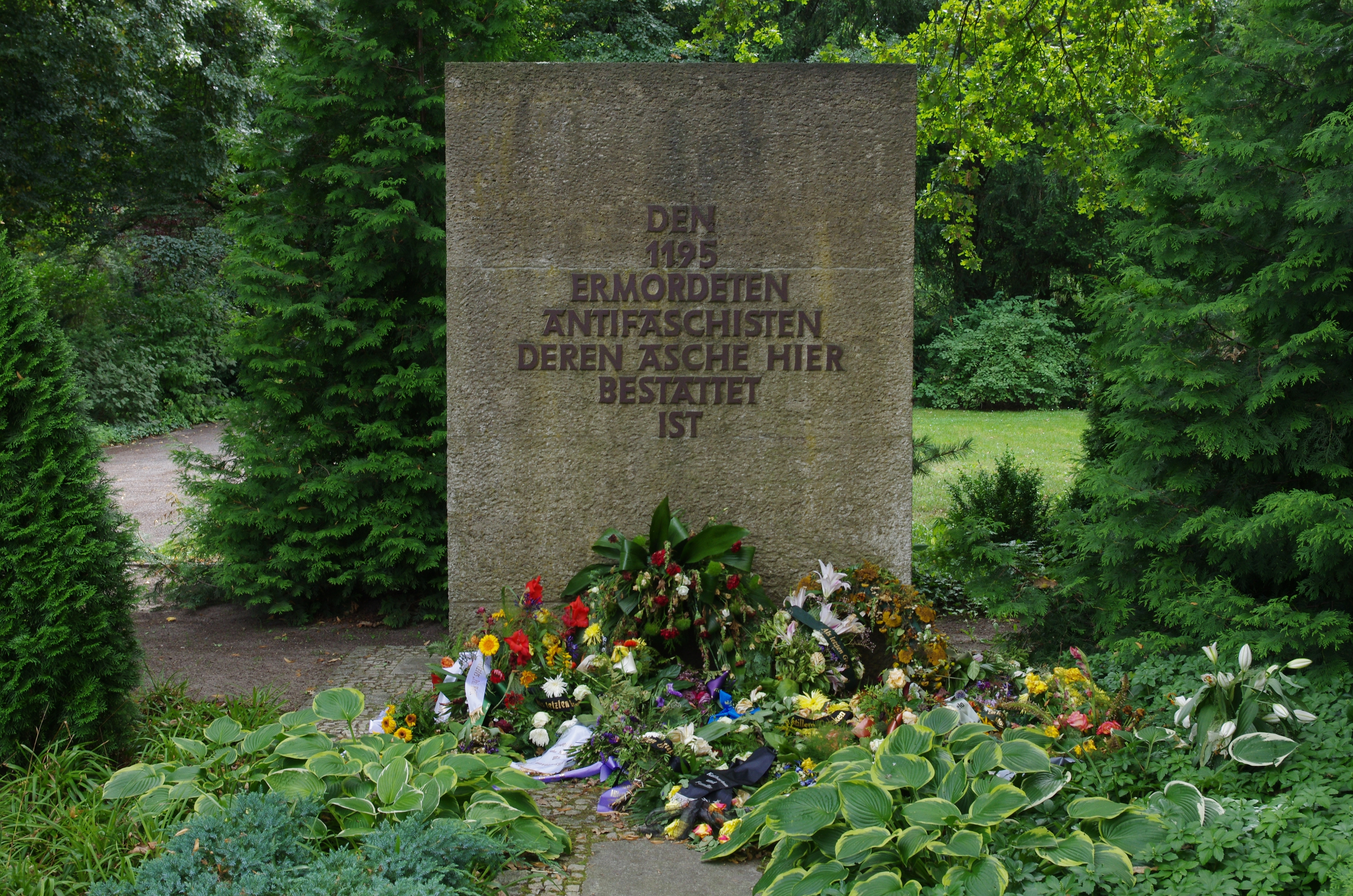 Baumschulenweg in Berlin. Der Friedhof steht unter Denkmalschutz. Hier das Denkmal der Ermordeden des Dritten Reiches.